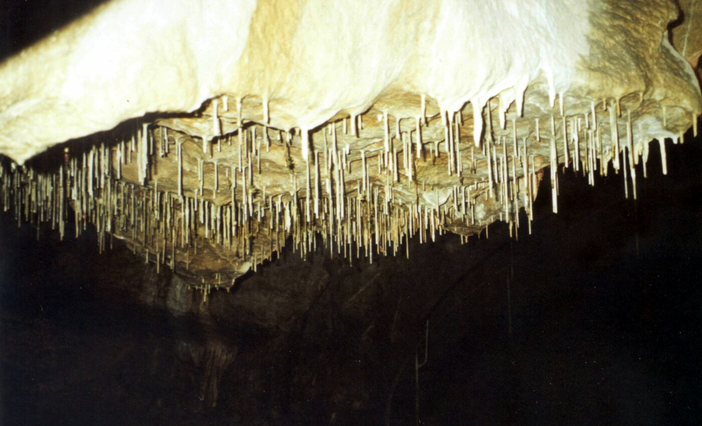 Teufelshöhle bei Pottenstein, Stalaktiten im Barbarossadom